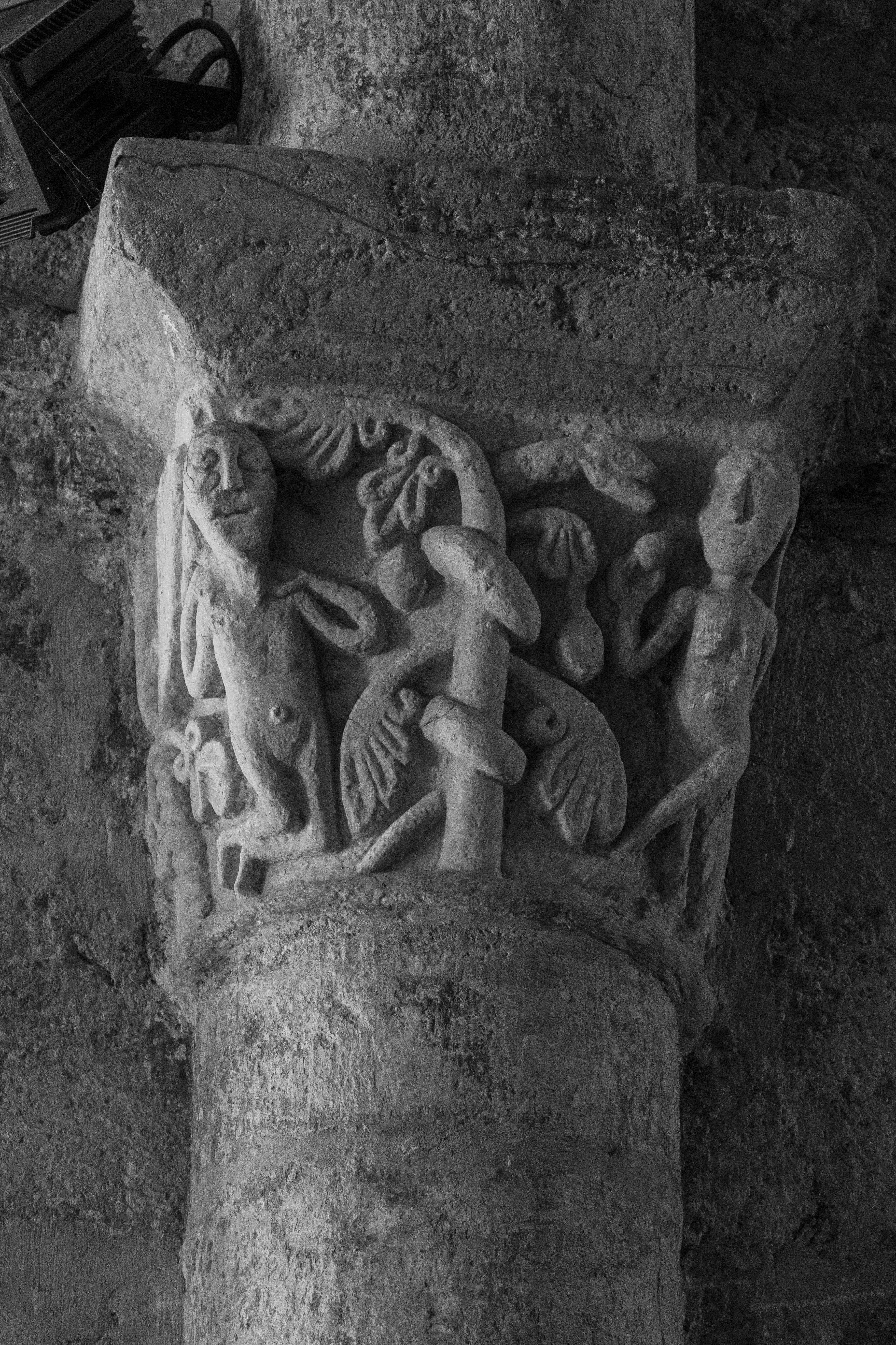 Chapiteau de l'abbatiale Saint-André de Lavaudieu. .